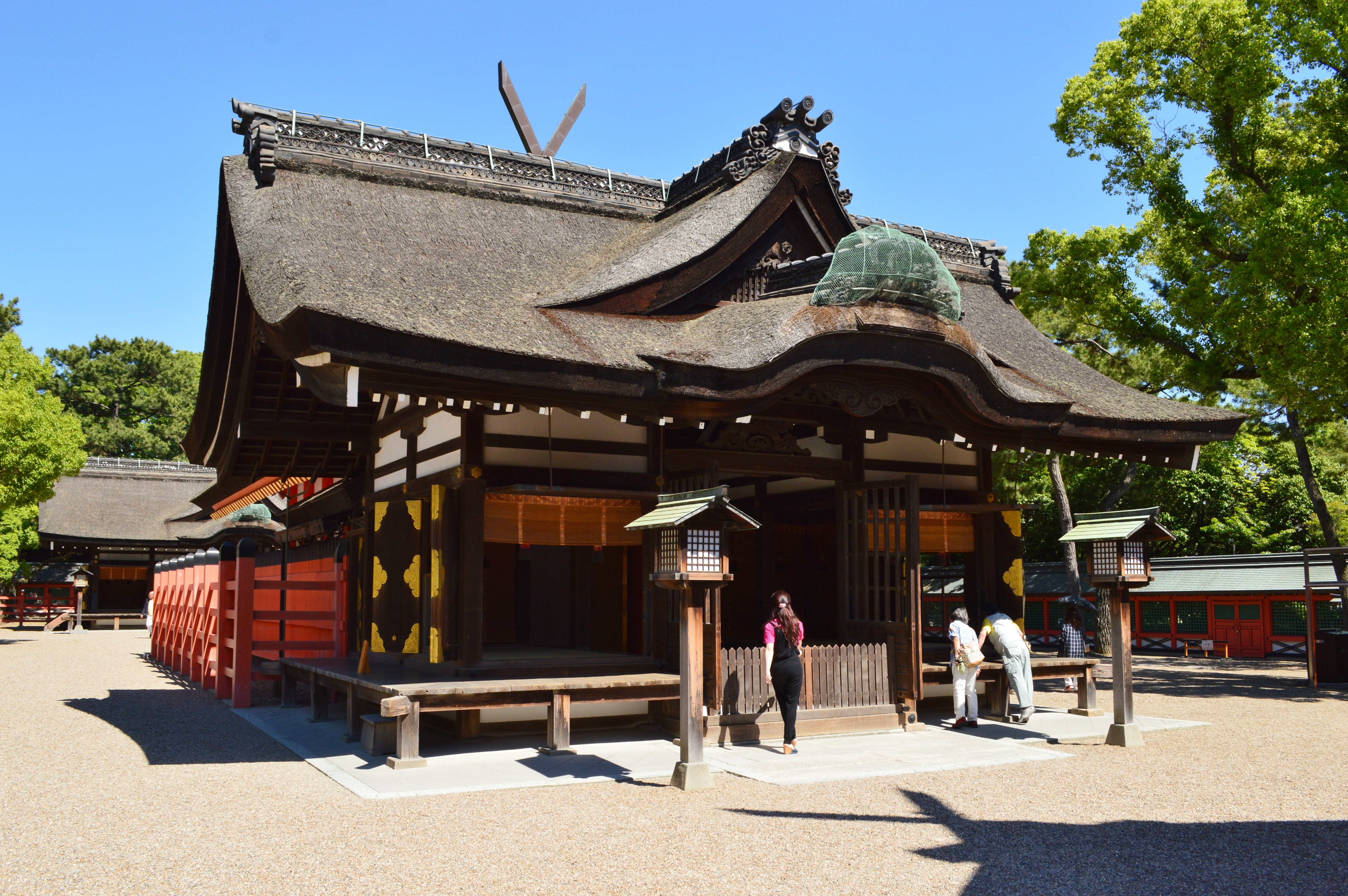 住吉大社 第二本宮幣殿